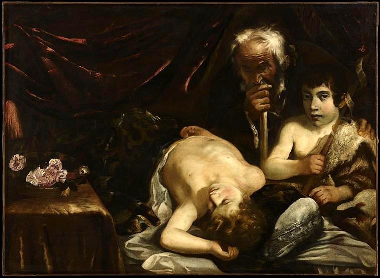 Jésus endormi devant Zacharie et Jean-Baptistetitle QS:P1476,fr:"Jésus endormi devant Zacharie et Jean-Baptiste" label QS:Lfr,"Jésus endormi devant Zacharie et Jean-Baptiste"